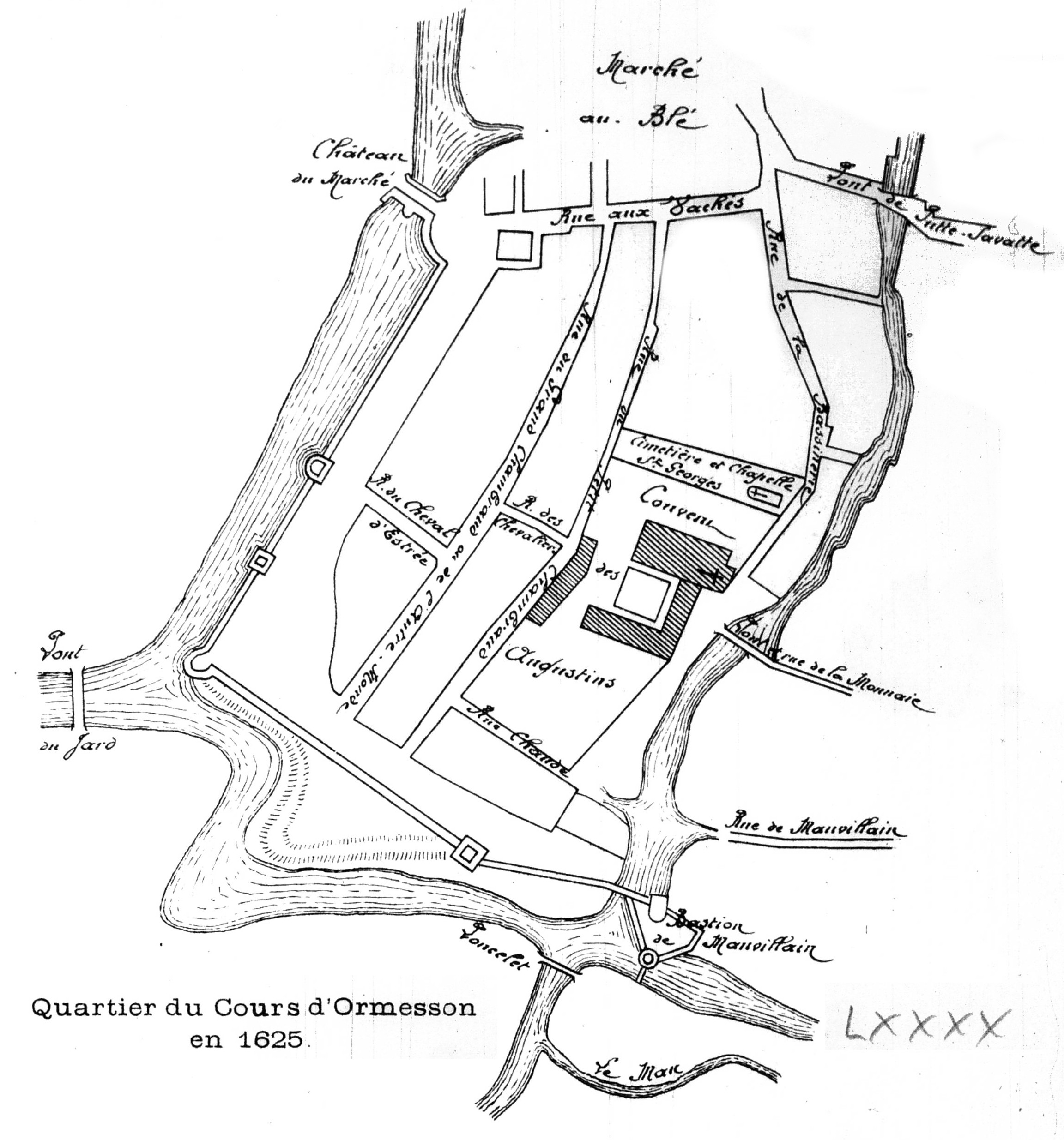 vue ancienne du cours.